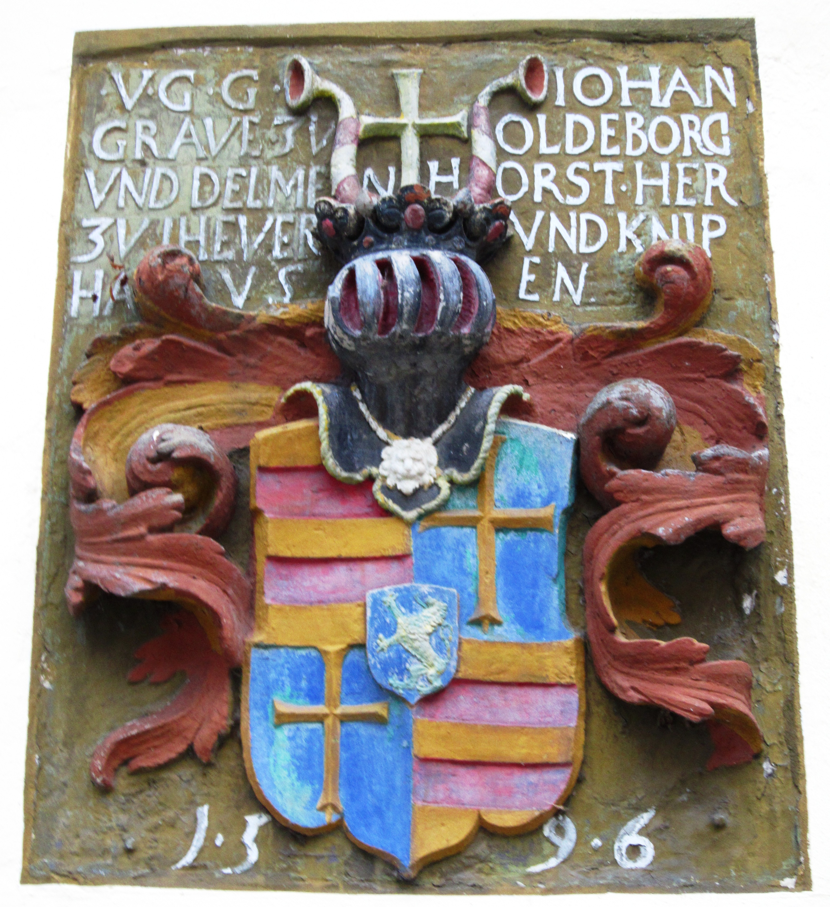 Schloss Neuenburg (Zetel - Neuenburg - Friesland)